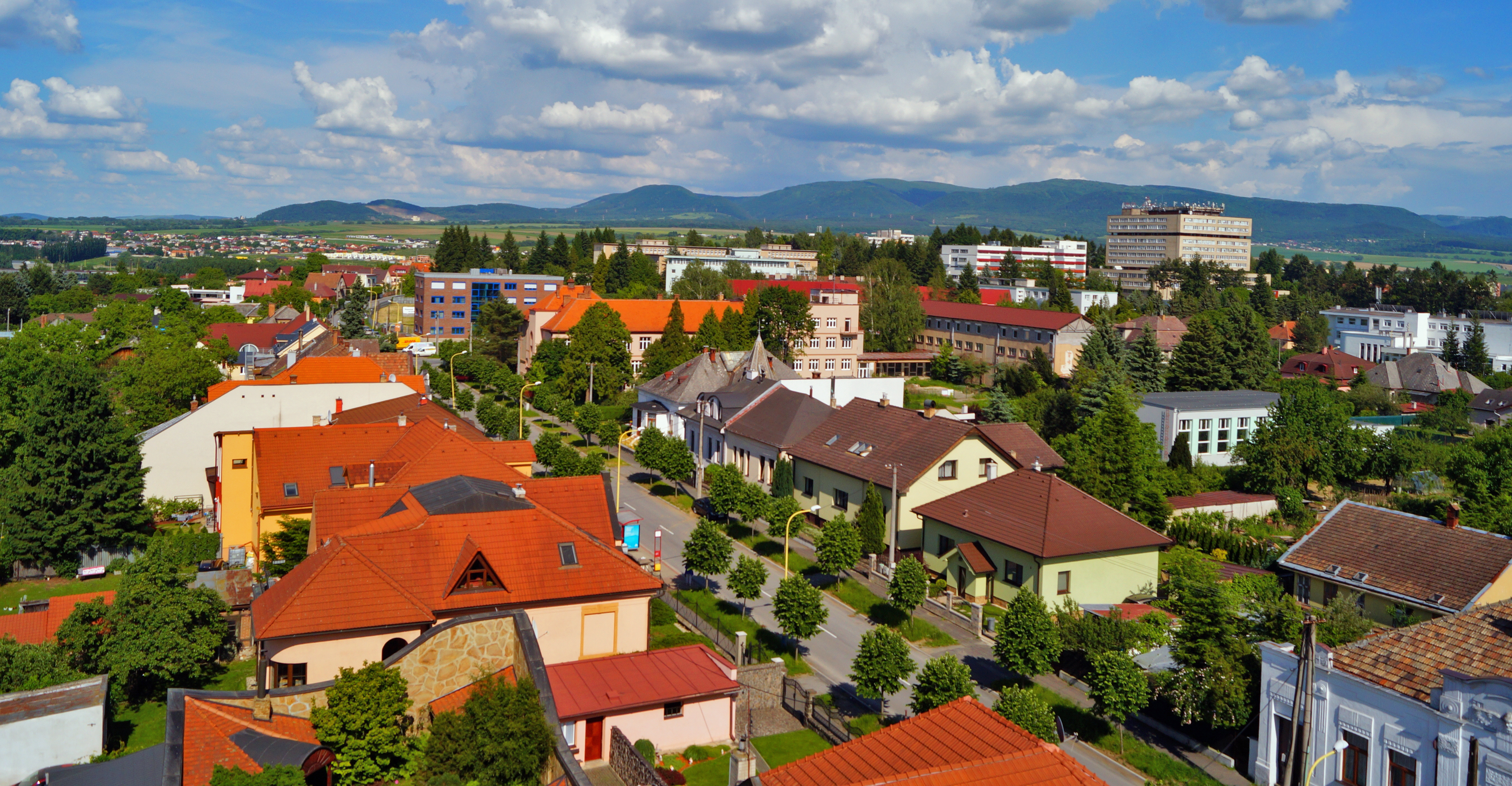 Časť Táboriska z Vodárenskej veže